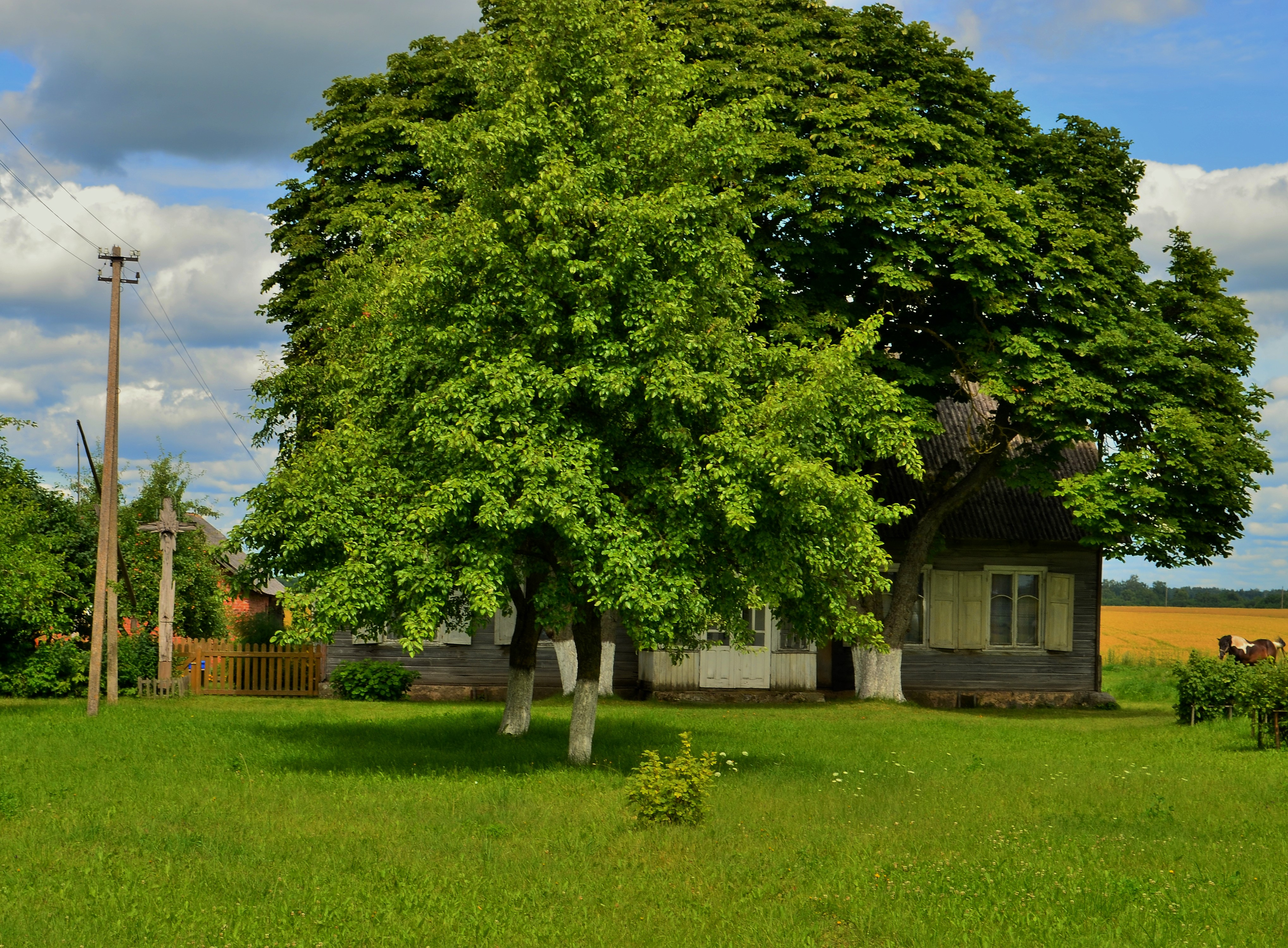 Senovinė gryčia ir V. Svirskio kryžius, Pakruostė, Kėdainių raj.